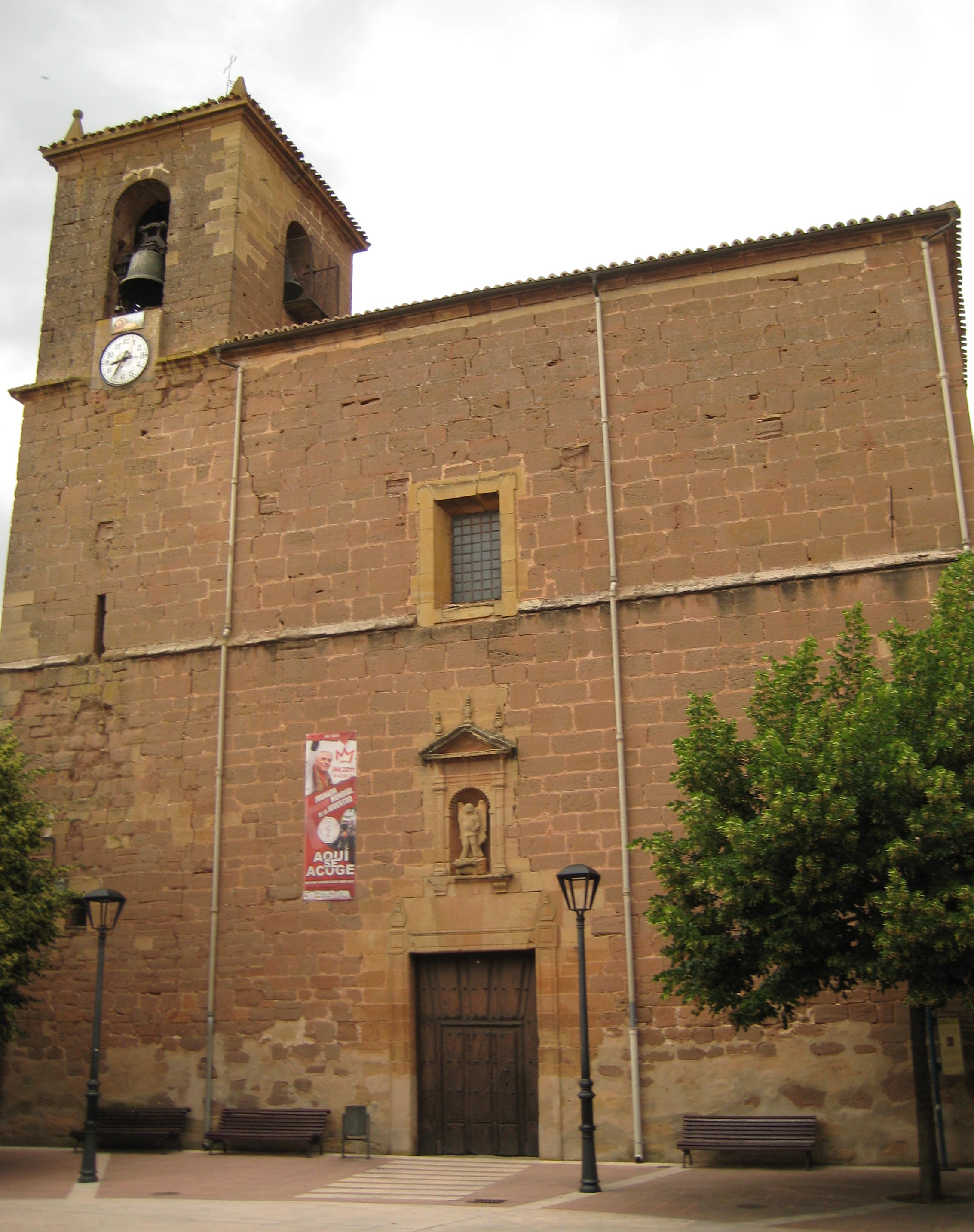 Iglesia de San Miguel, desde la Plaza Generalísimo Franco de Tricio, La Rioja, España.